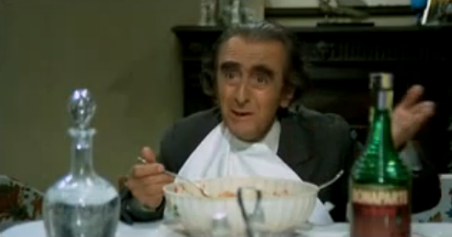 Enzo Maggio in Piedone lo sbirro (1973).